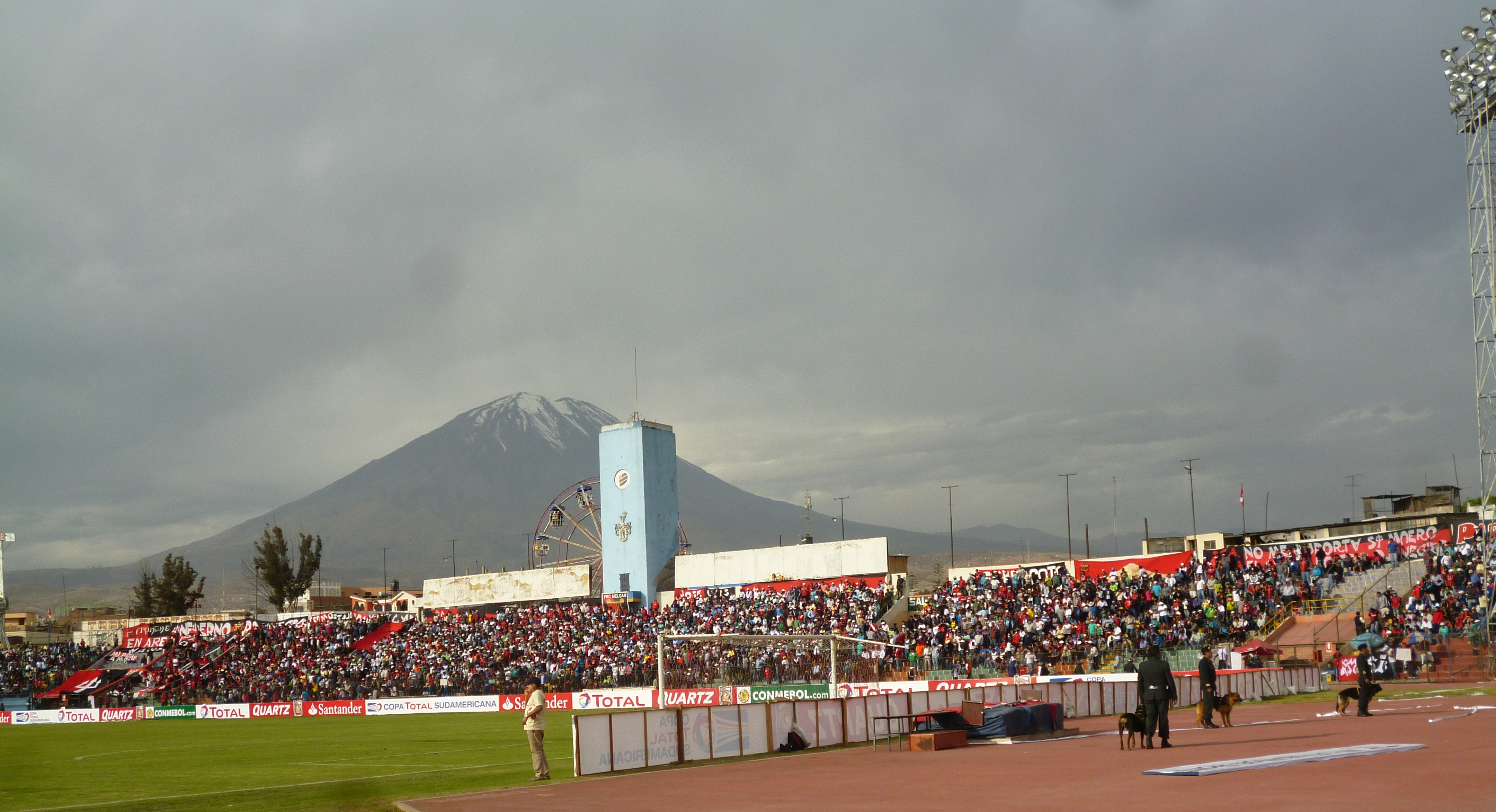 Foto de la Tribuna Oriente del Estadio Mariano Melgar de la ciudad de Arequipa